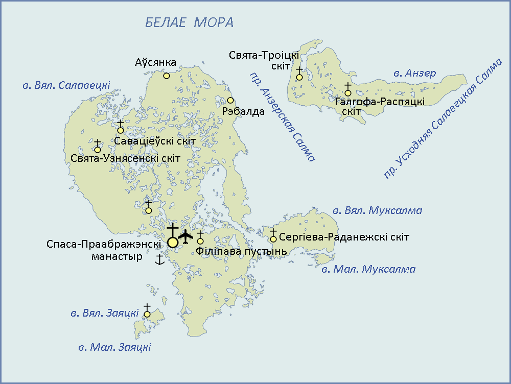 Карта Салавецкіх астравоў